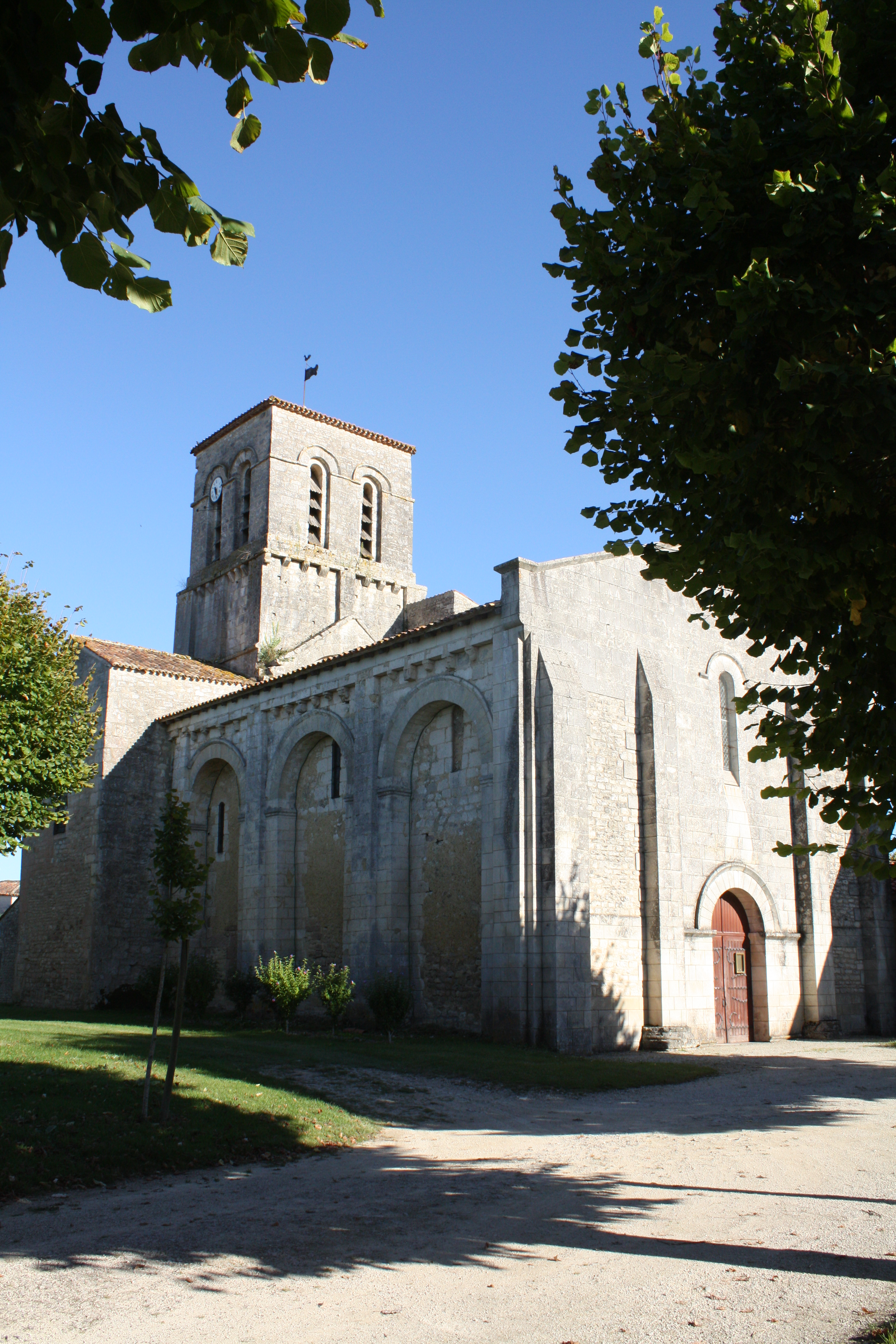 Église de la Transfiguration de Cressé (Classé) .